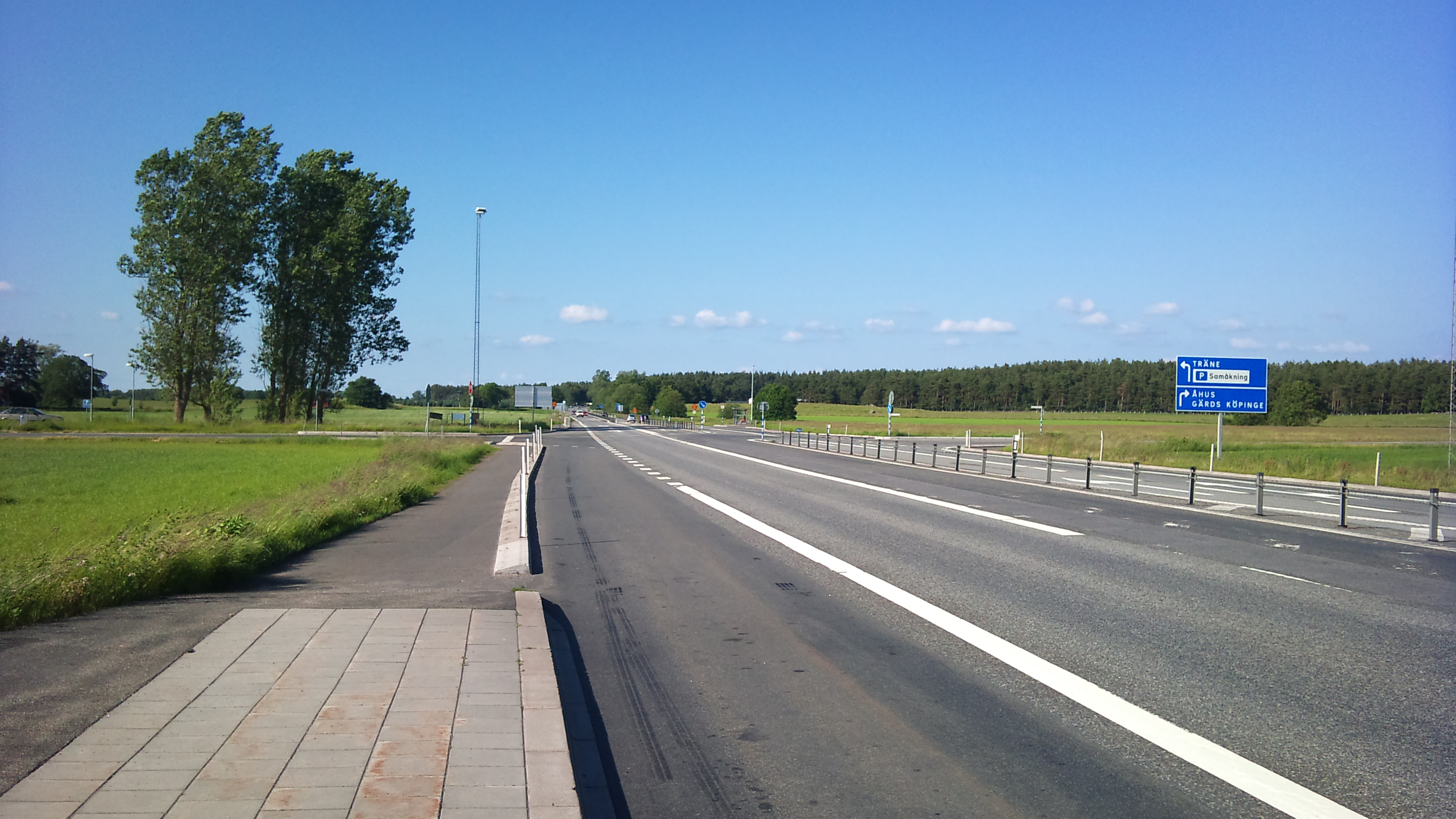 Väg 19 och E22 i Kristianstads kommun vid Tings Nöbbelövs busshållplats